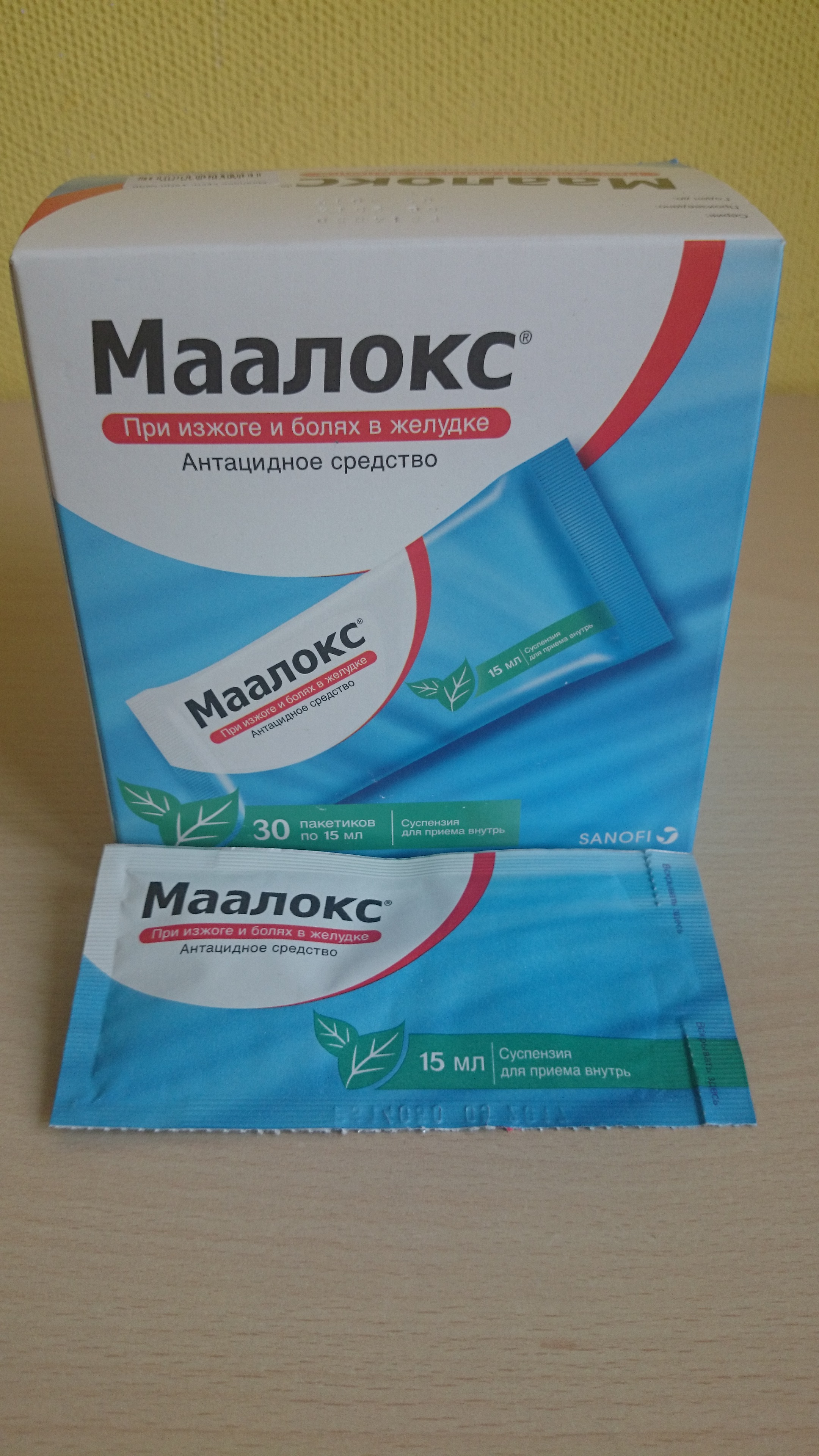 Maaloxx New package